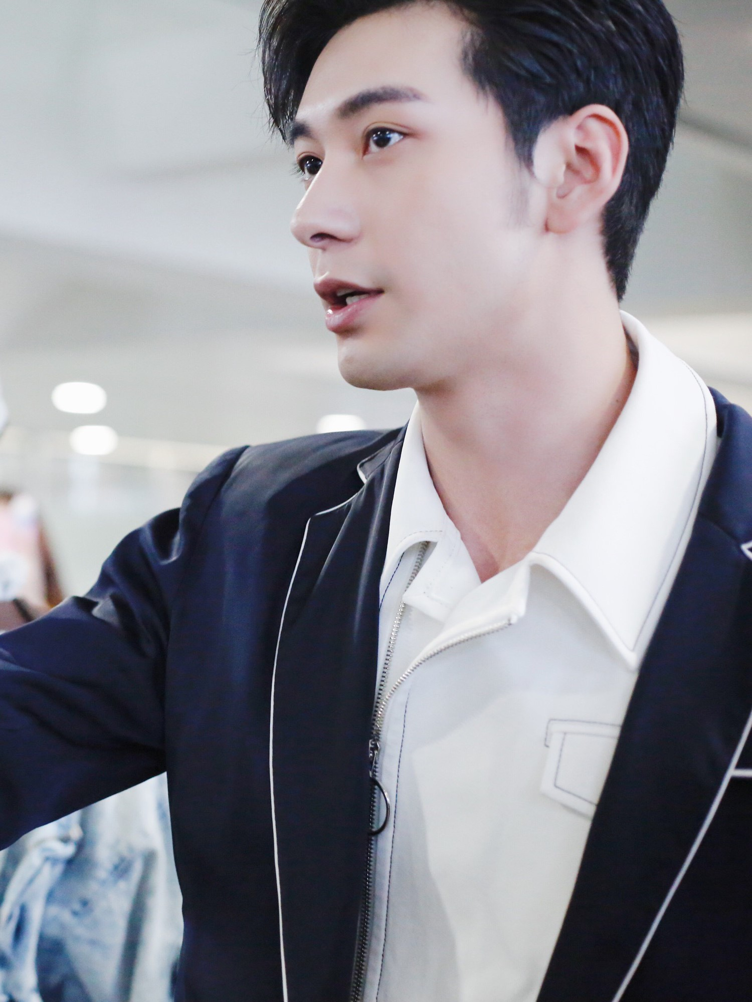 陈星旭 (20190402)